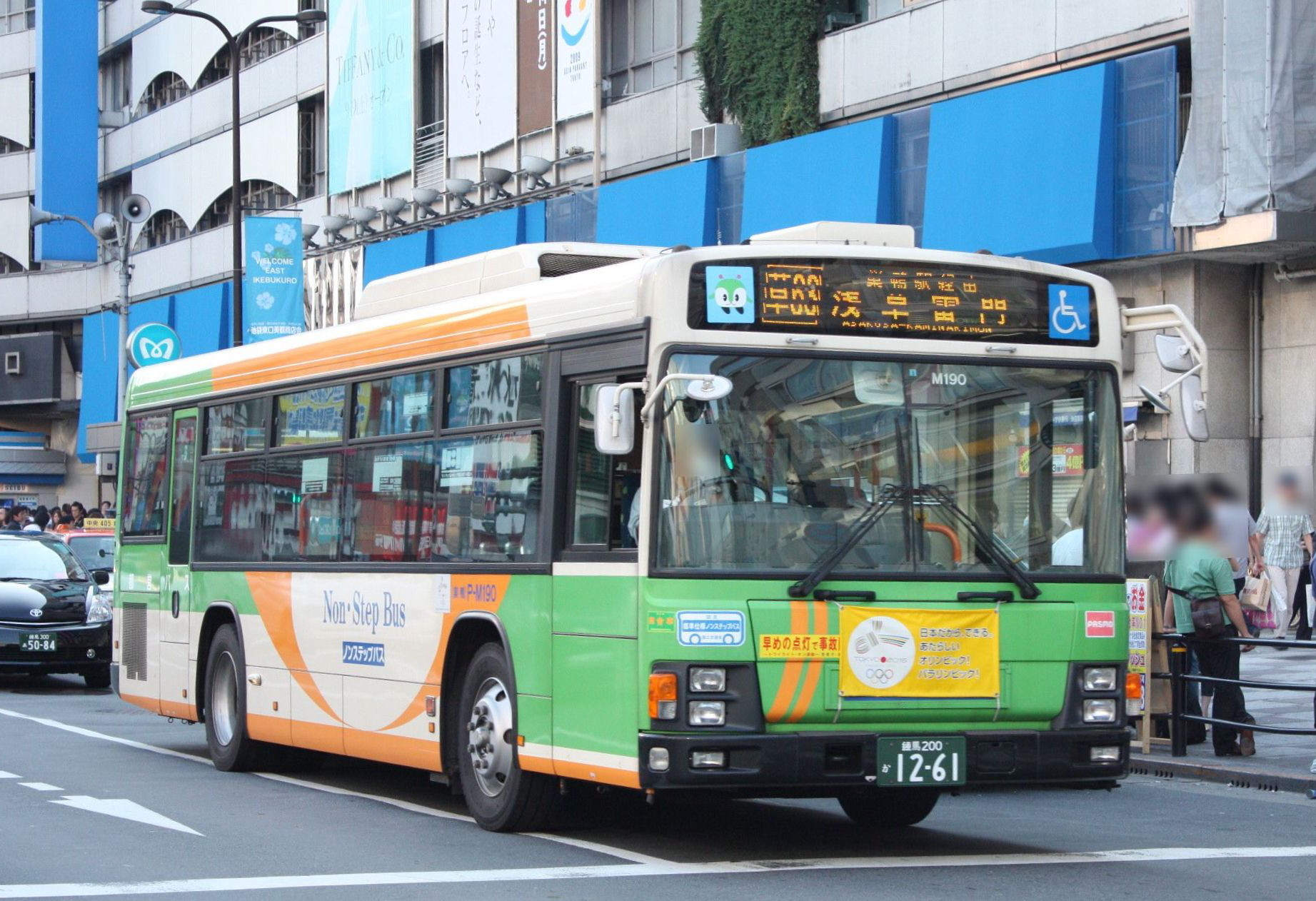 都営バス巣鴨営業所 車番:P-M190 PJ-LV234L1